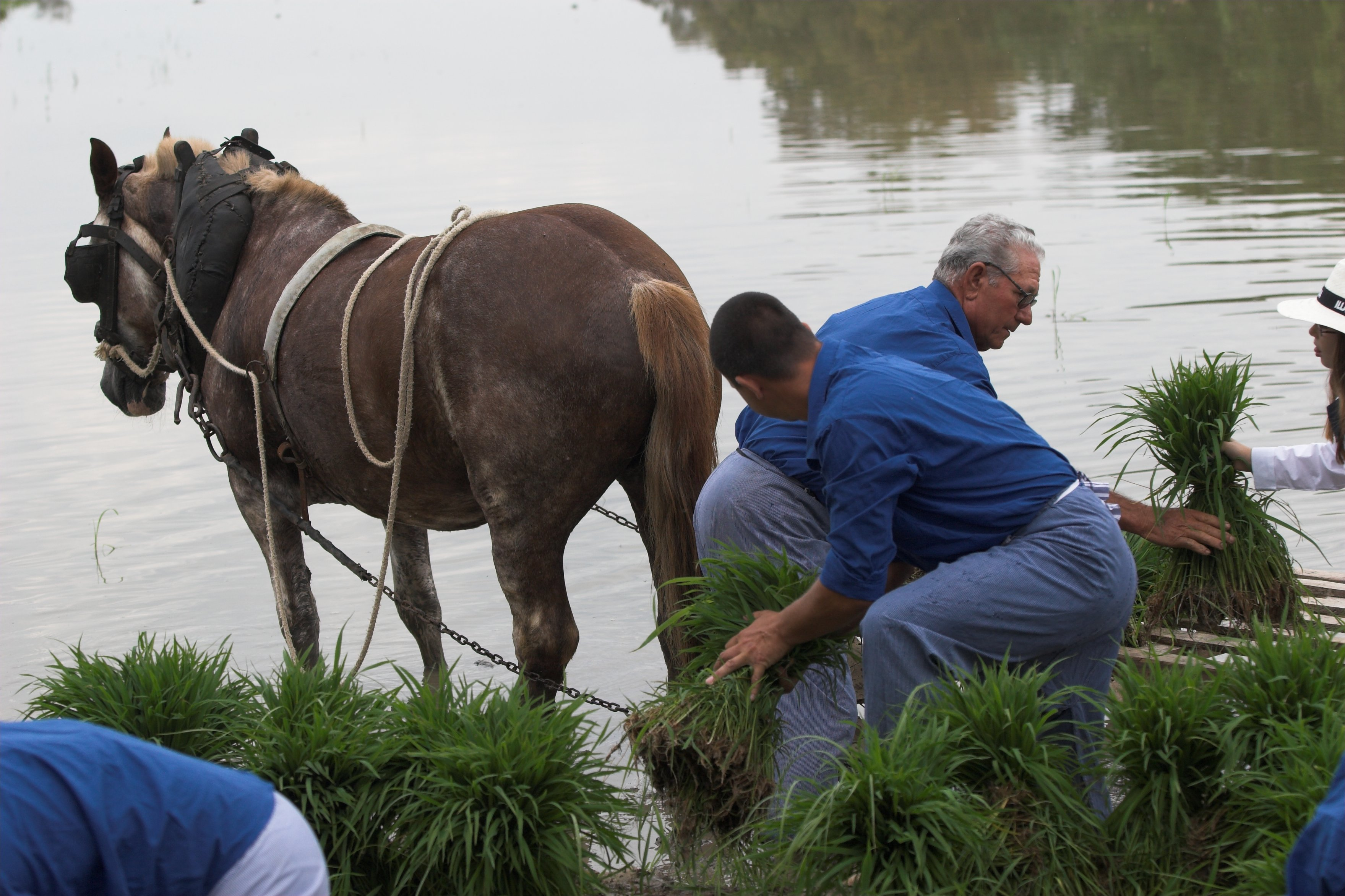 Delta de l'Ebre This is a a photo of a natural area in Catalonia, Spain, with id: ES510102